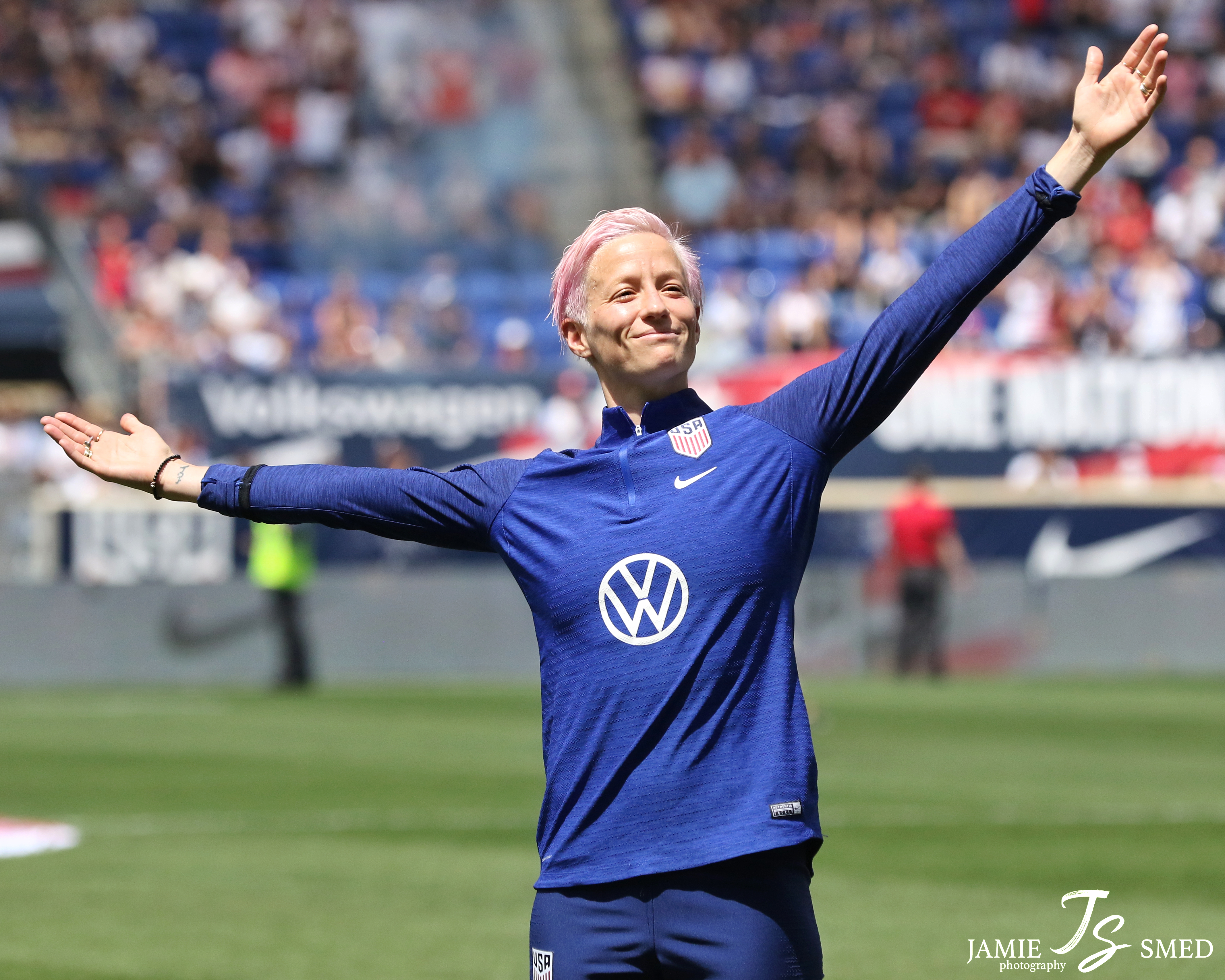 Megan Rapinoe